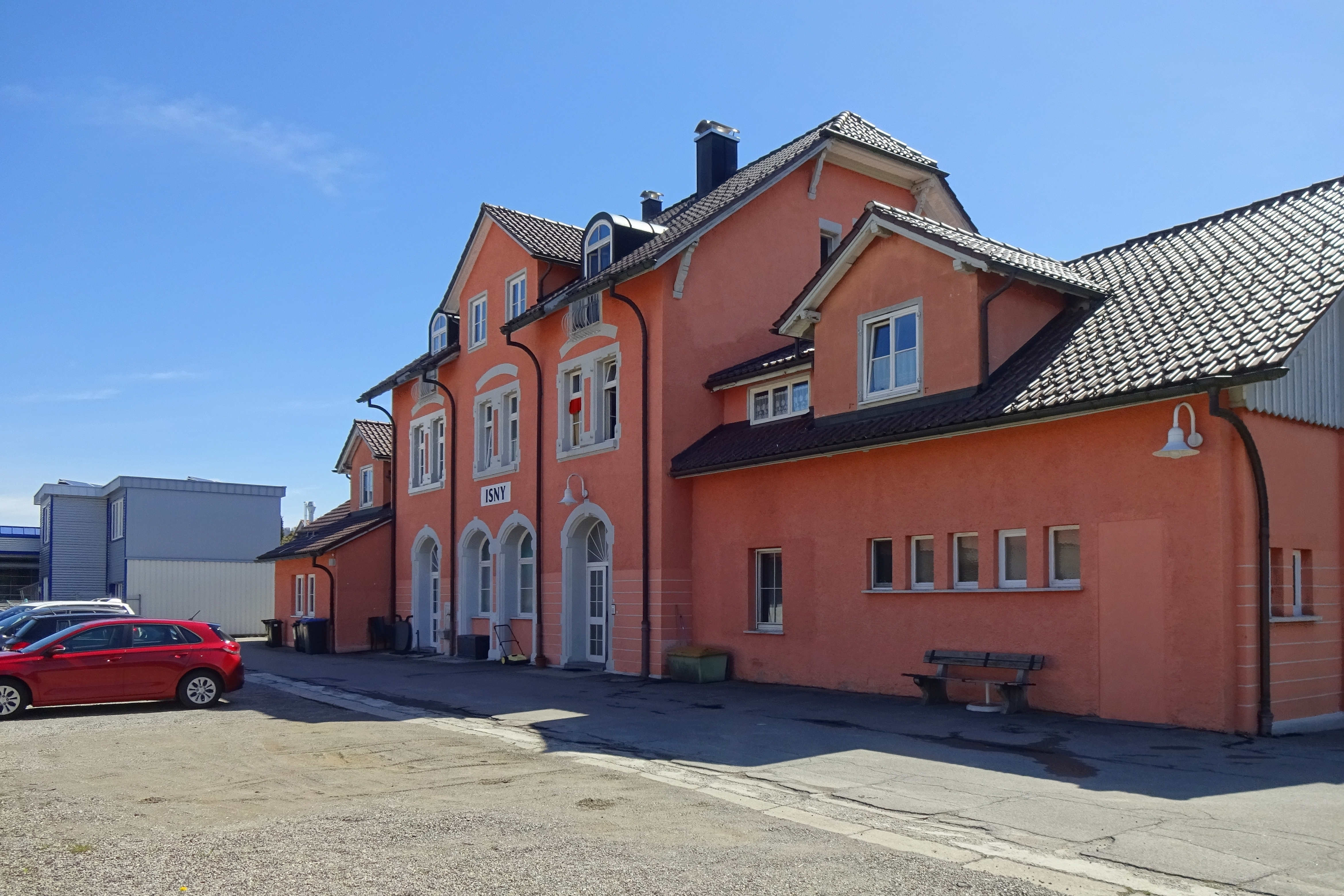 Ehemals Bahnhofsgebäude Isny - Gleisseite